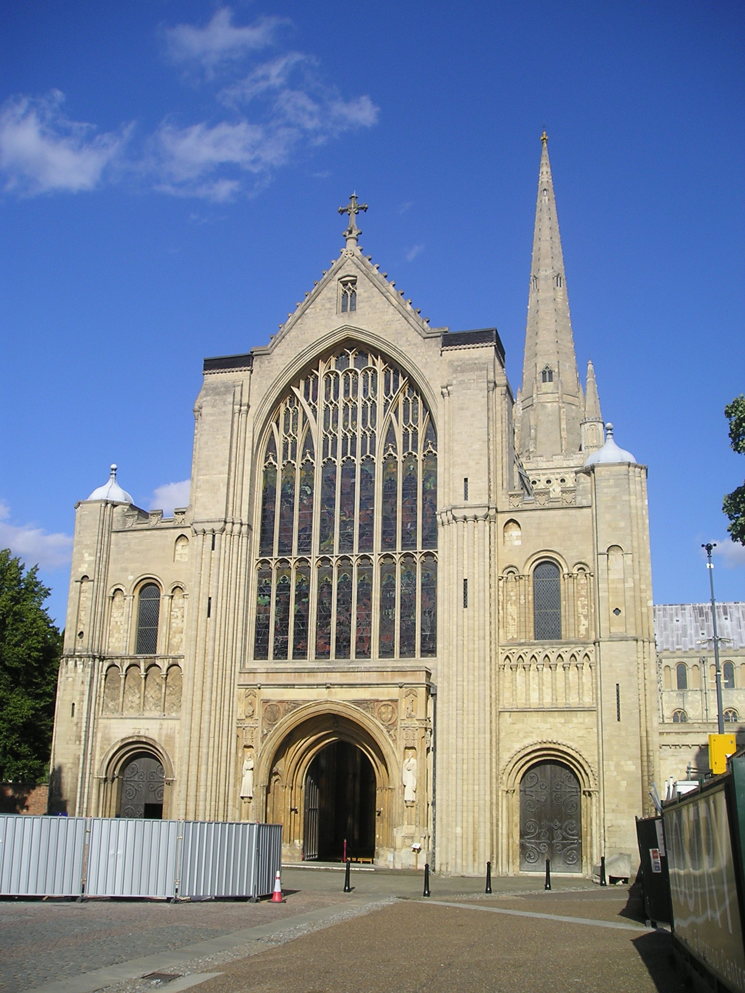 Norwich_Cathedral,_Westfassade